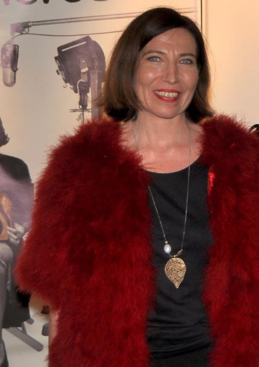 Élise Larnicol à la cérémonie des prix Lumières